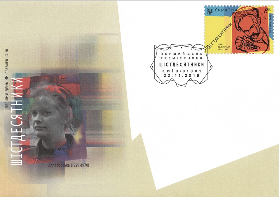 Шістдесятники КПД с/п Київ 2019